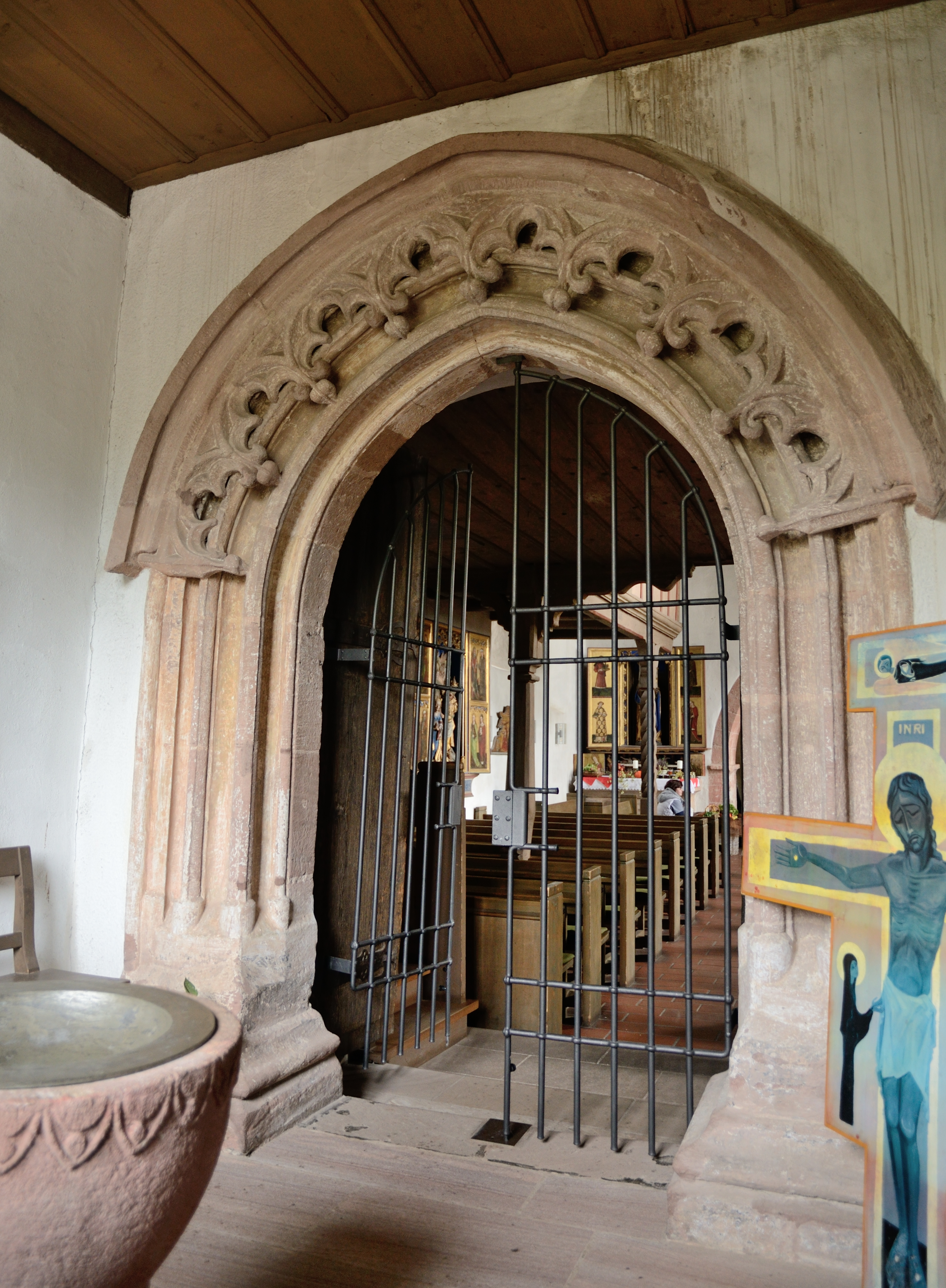 St. Veitskirche (Veitsbronn), ehemaliges Westportal der Kirche, jetzt Teil der 1930 erbauten Vorhalle